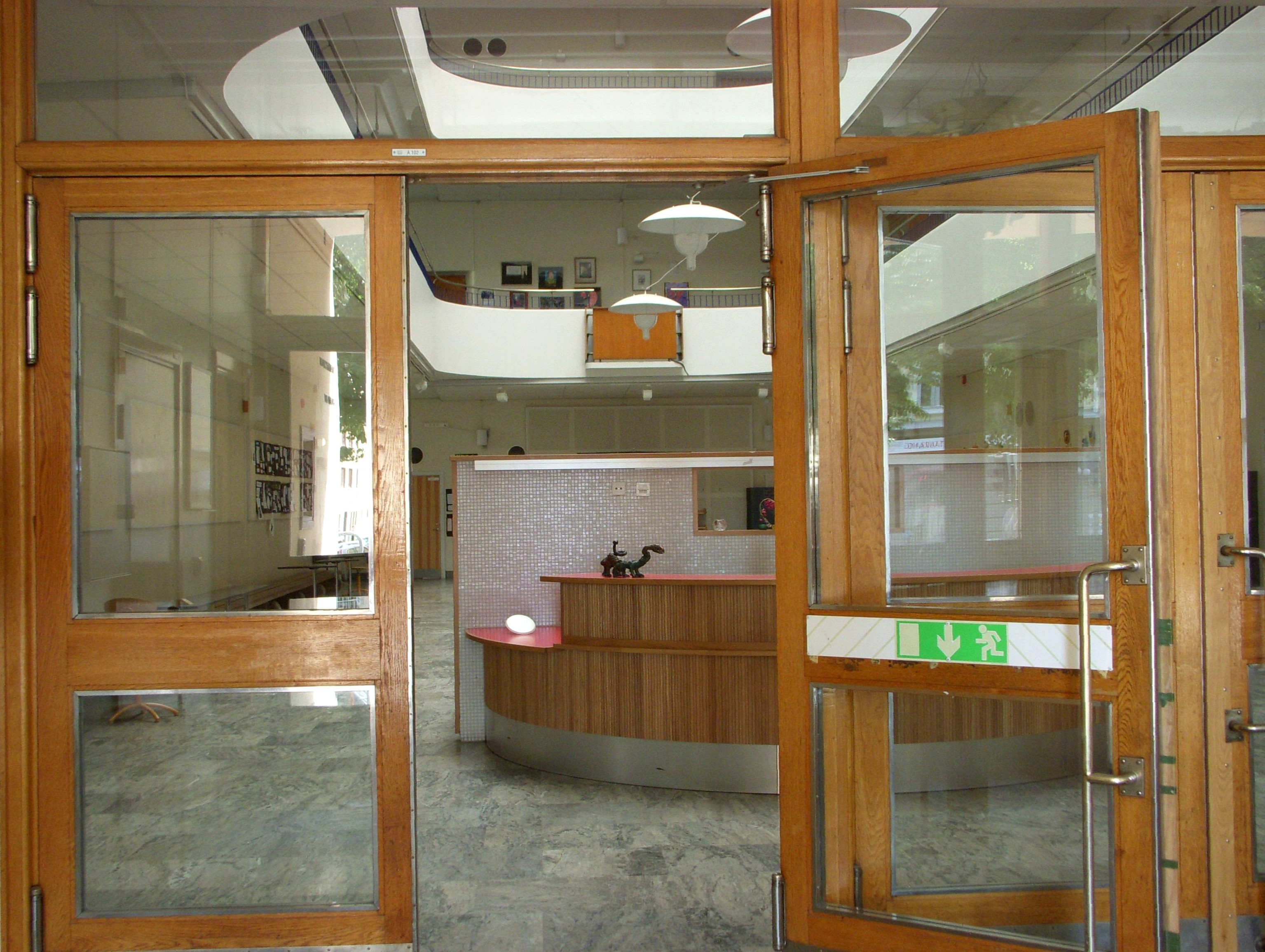 Södermalmsskolan på Södermalm, Stockholm